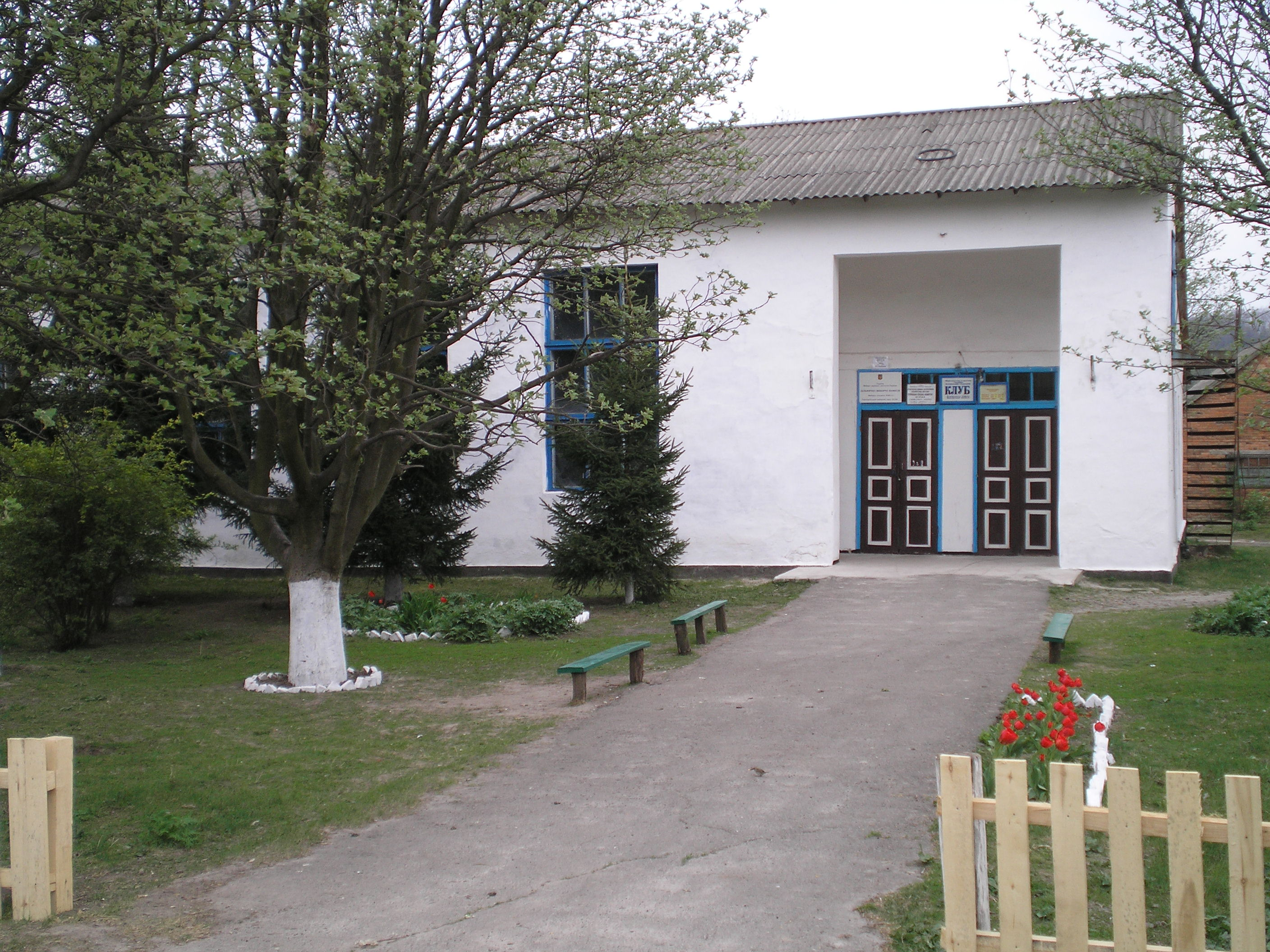 Будинок культури в селі Терни Лубенського району Полтавської області